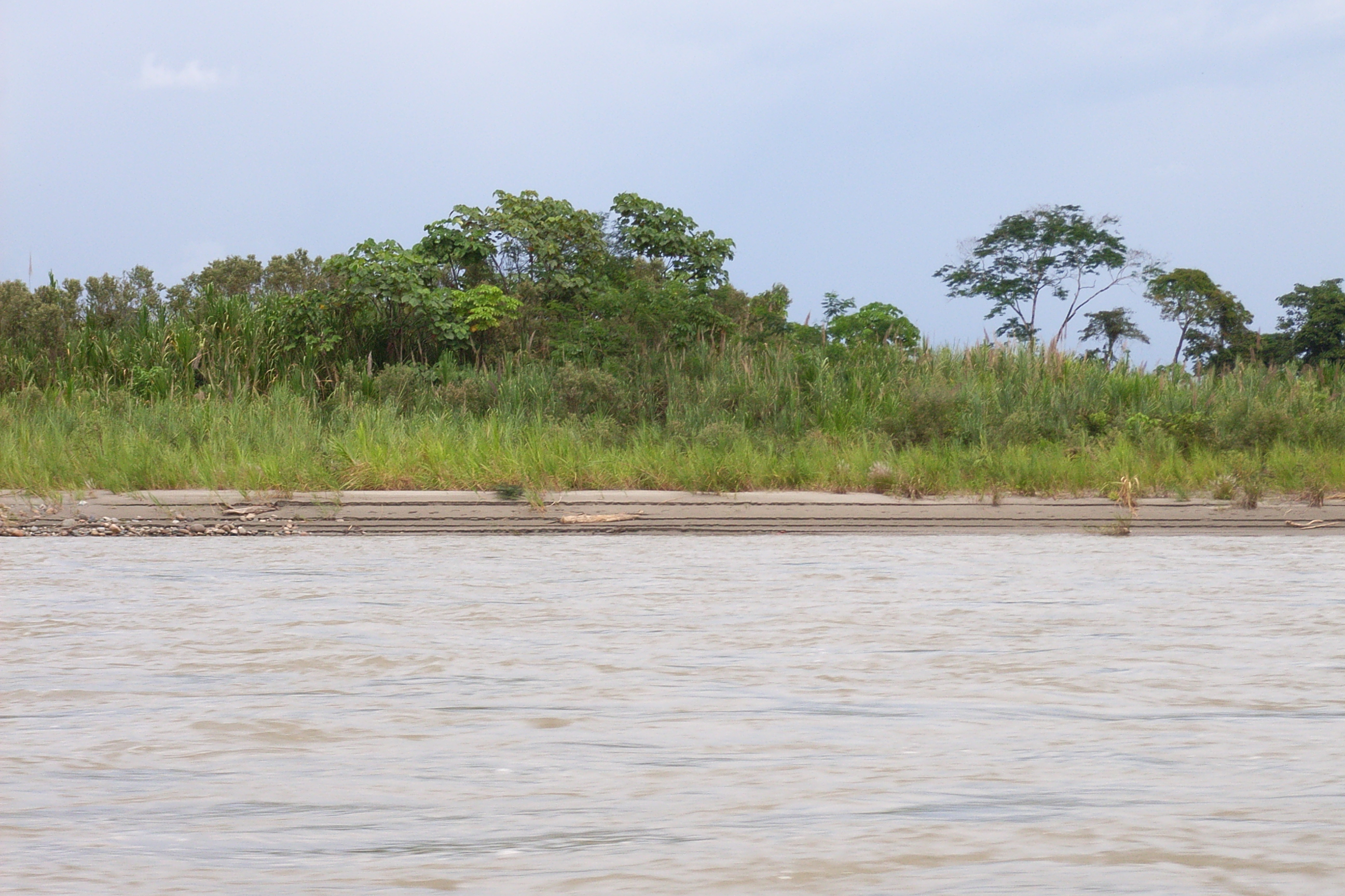 Alluvialboden am Rio Napo, Ecuador, östlich von Tena